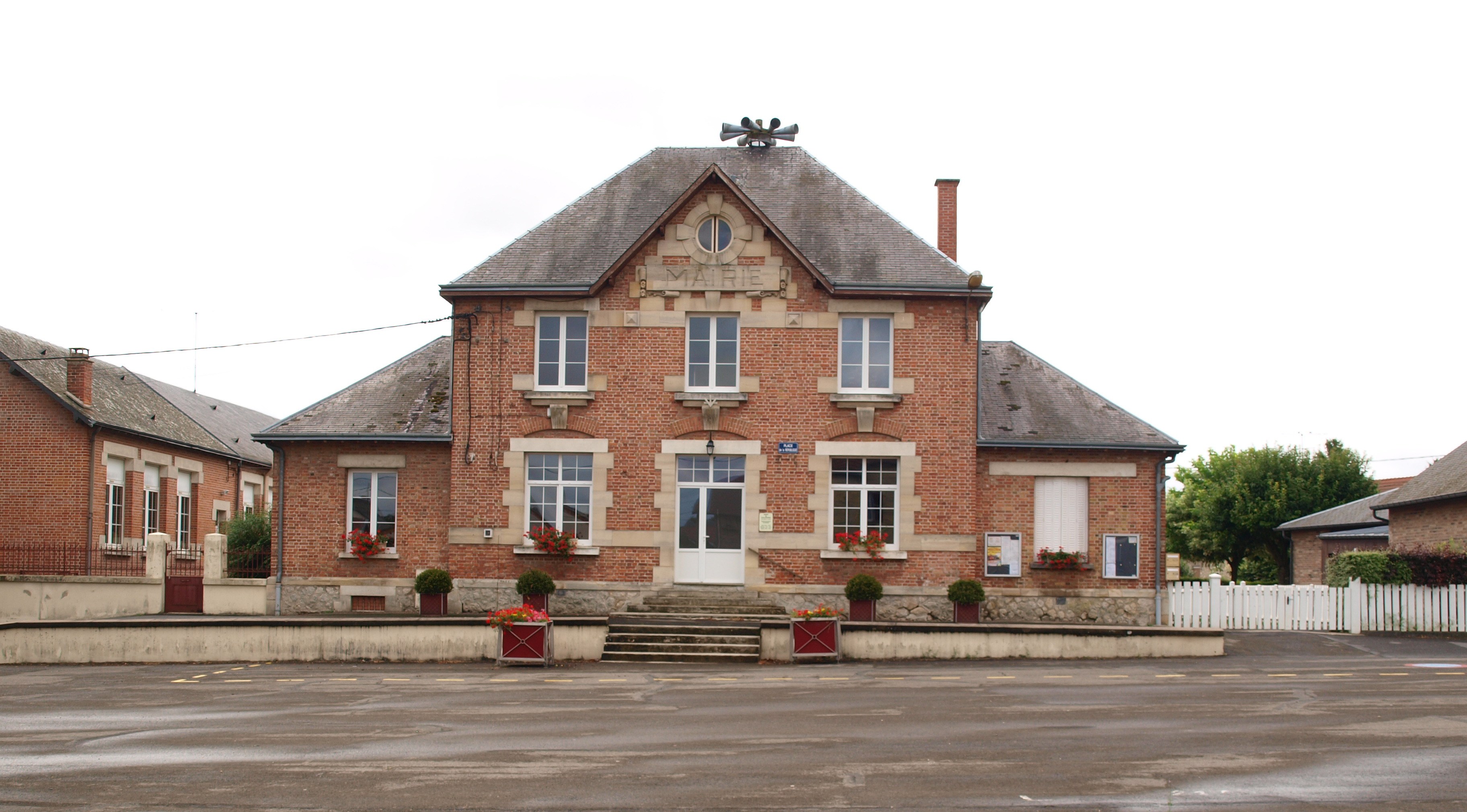 Challerange (Ardennes, France) : mairie